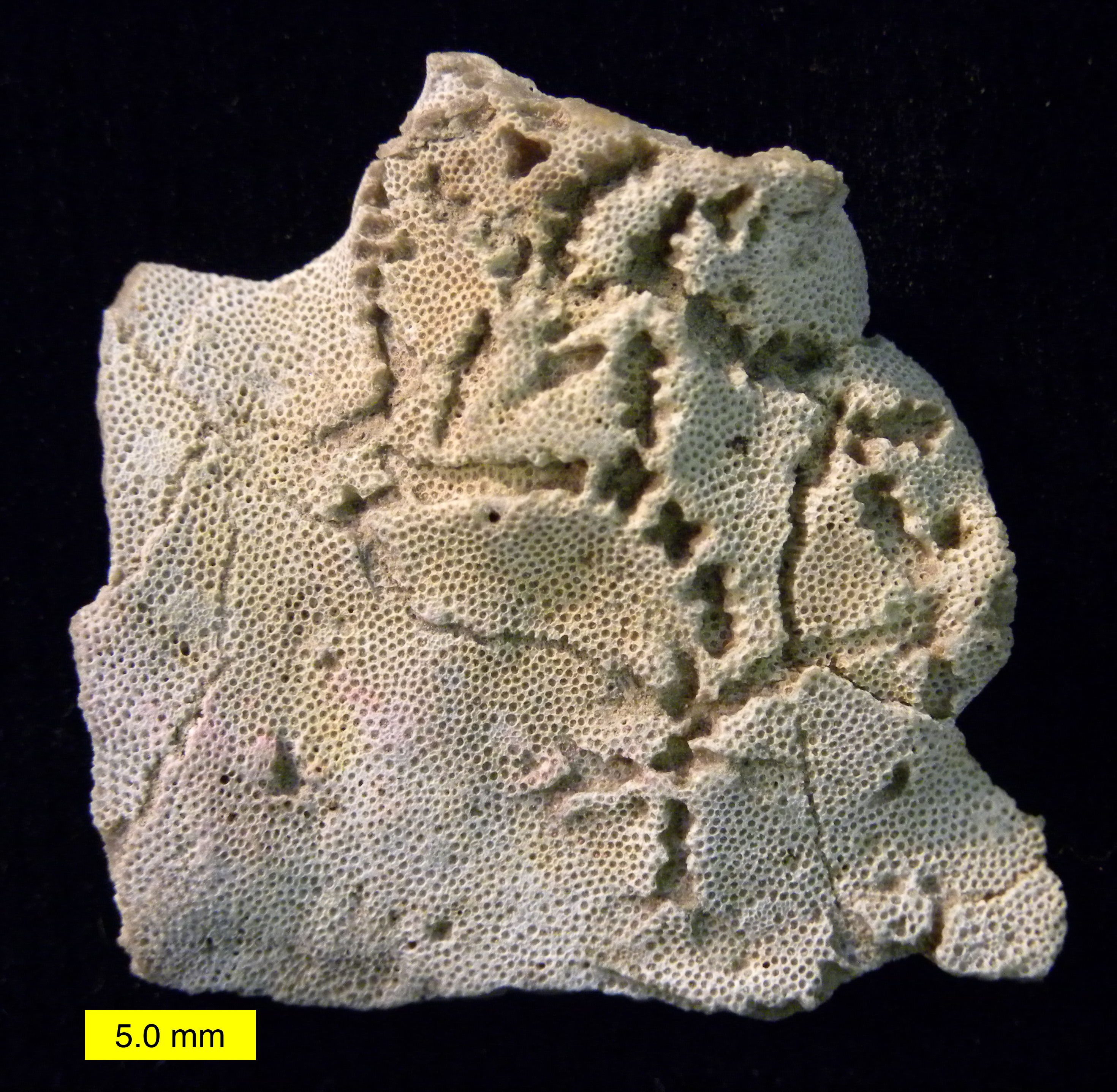 Catellocaula vallata bioclaustration; Ordovician of Ohio.